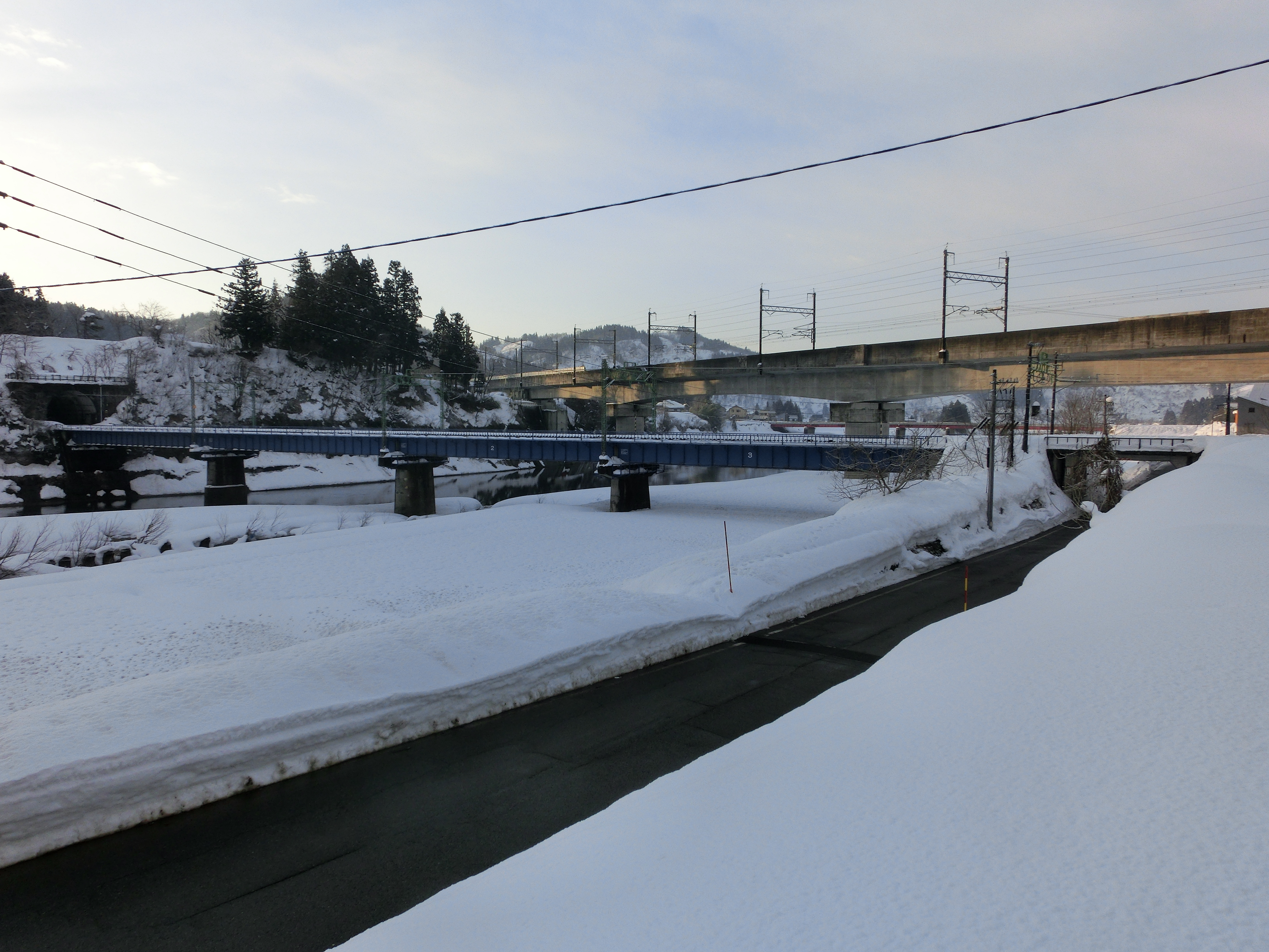 この画像は2018年2月4日投稿者によって、新潟県長岡市川口中山野田（新潟県道333号線そば）にて撮影された、魚野川に架かっている3本の橋の写真。（手前から、上越線第四魚野川橋梁、上越新幹線魚野川橋梁、国道17号線和南津橋。）